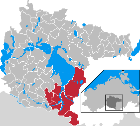 Amt Rechlin in Mecklenburg-Western Pomerania - District Müritz